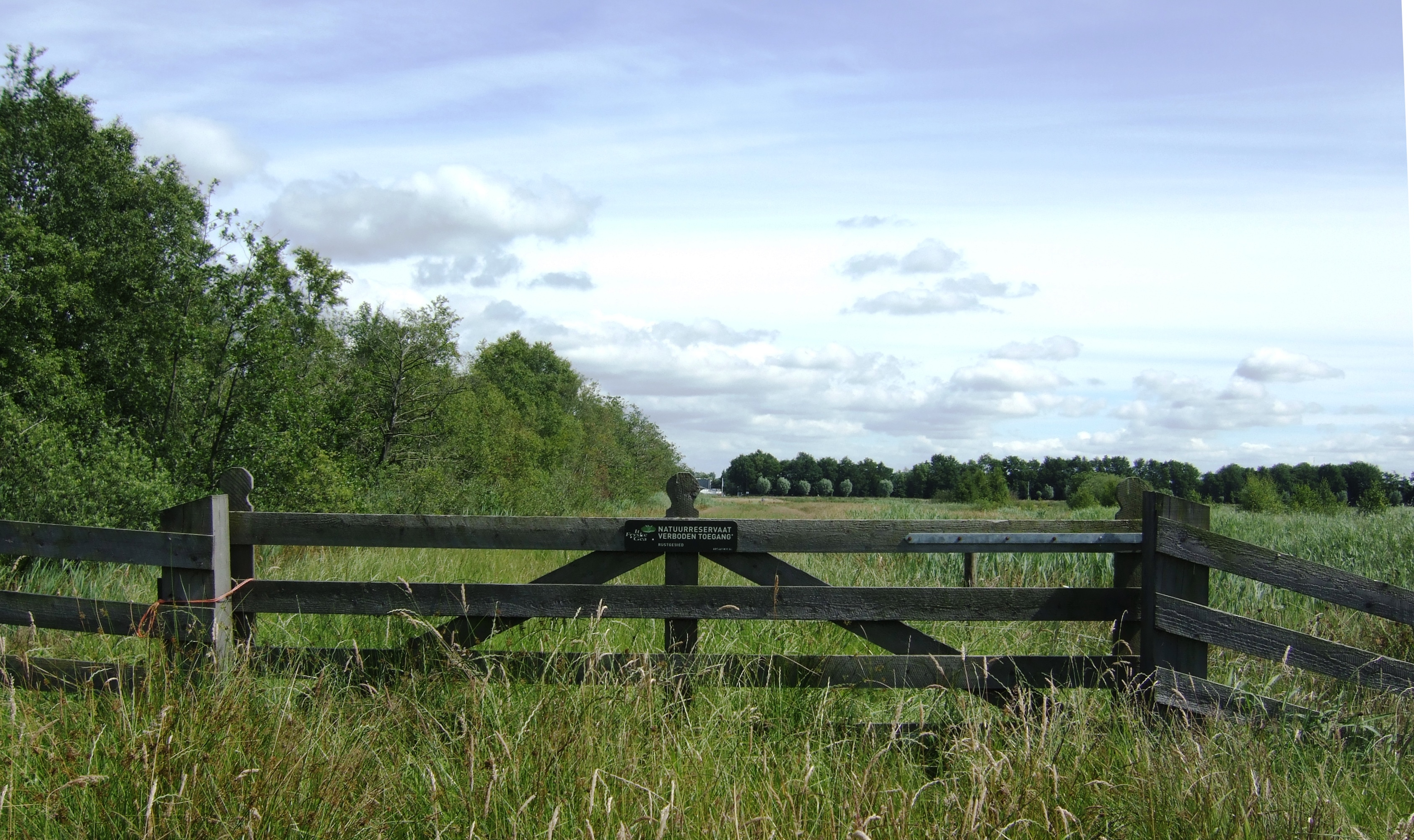 Nationaal Park De Alde Feanen. Locatie, It Wikelslân. Hekwerk. This is a photo or sound file made in De Alde Feanen National Park in the Netherlands, with the main subject of the file in the category: humans in nature